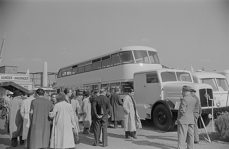 Original image description from the Deutsche Fotothek Besucher vor einem Bus auf dem Ausstellungsgelände der Technikmesse (Fahrzeuge)